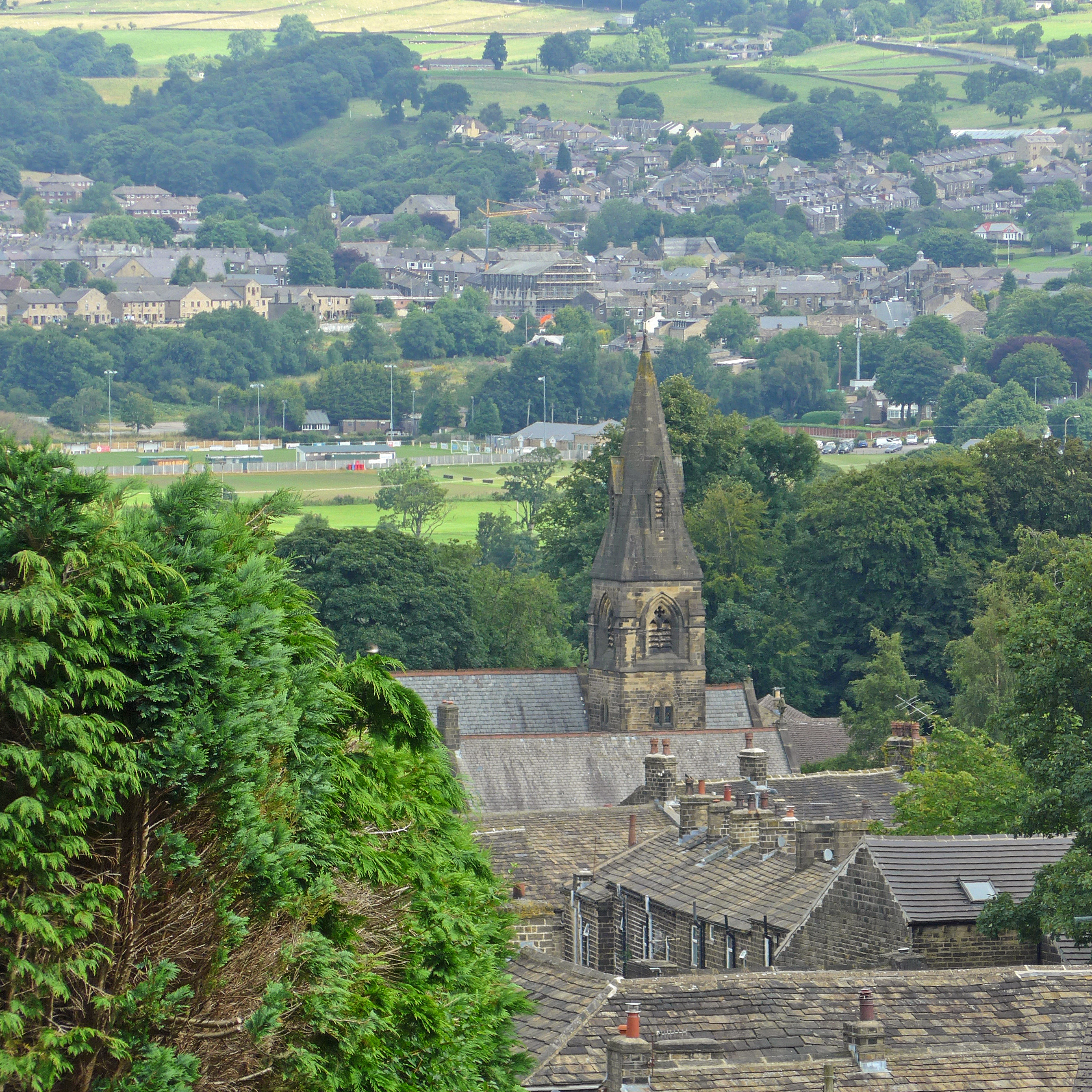 Steeton